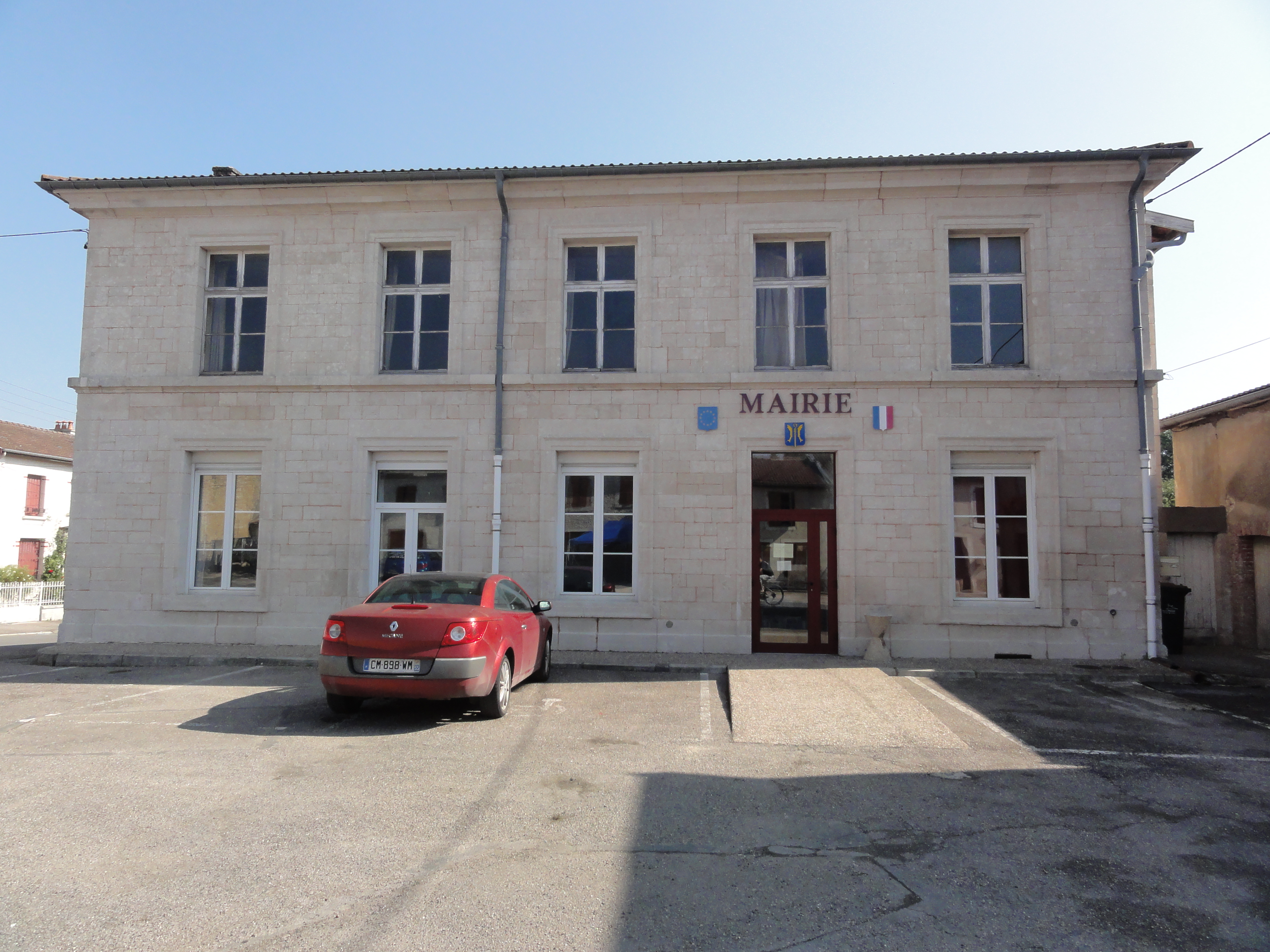 Tilly-sur-Meuse (Meuse) mairie